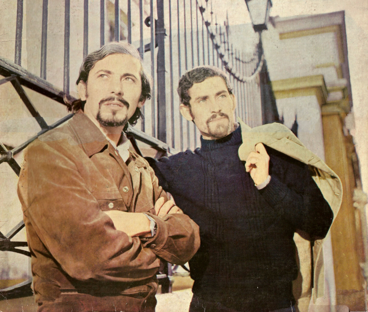 Foto del grupo de música "Los Olimareños", tomada en Argentina para el arte de tapa del álbum LP de vinilo serie Microfón I-328 editado en Argentina en 1973.